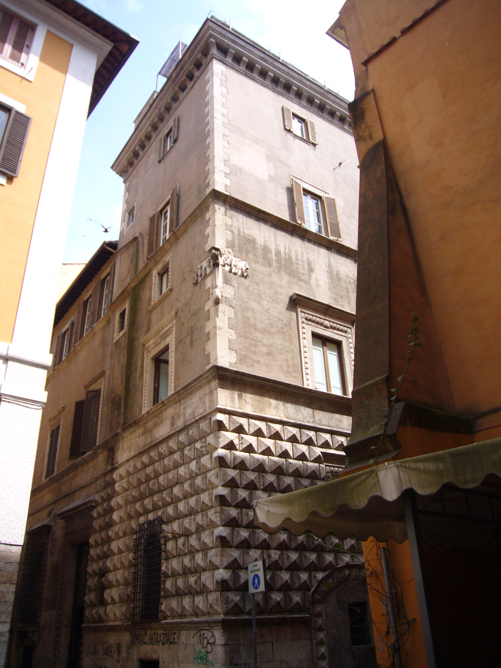 Roma, palazzo Santacroce Publicola, torre d'angolo tra via in Publicolis e via di santa Maria del Pianto.